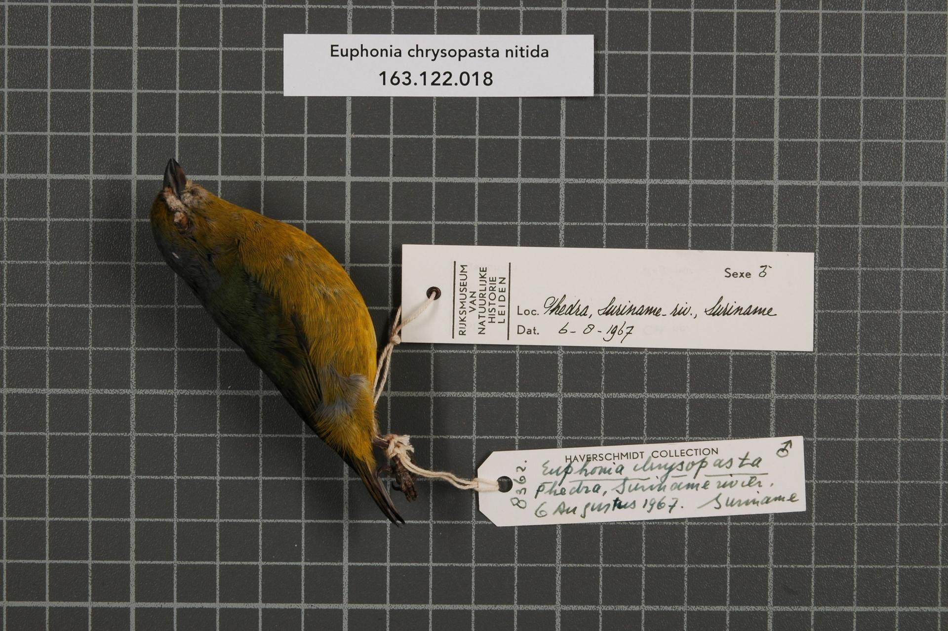 Euphonia chrysopasta nitida (Penard, 1923)